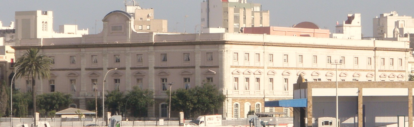 Palacio de la Aduana, Monumento a las Cortes, Casa de las cuatro Torres, Cádiz, España.